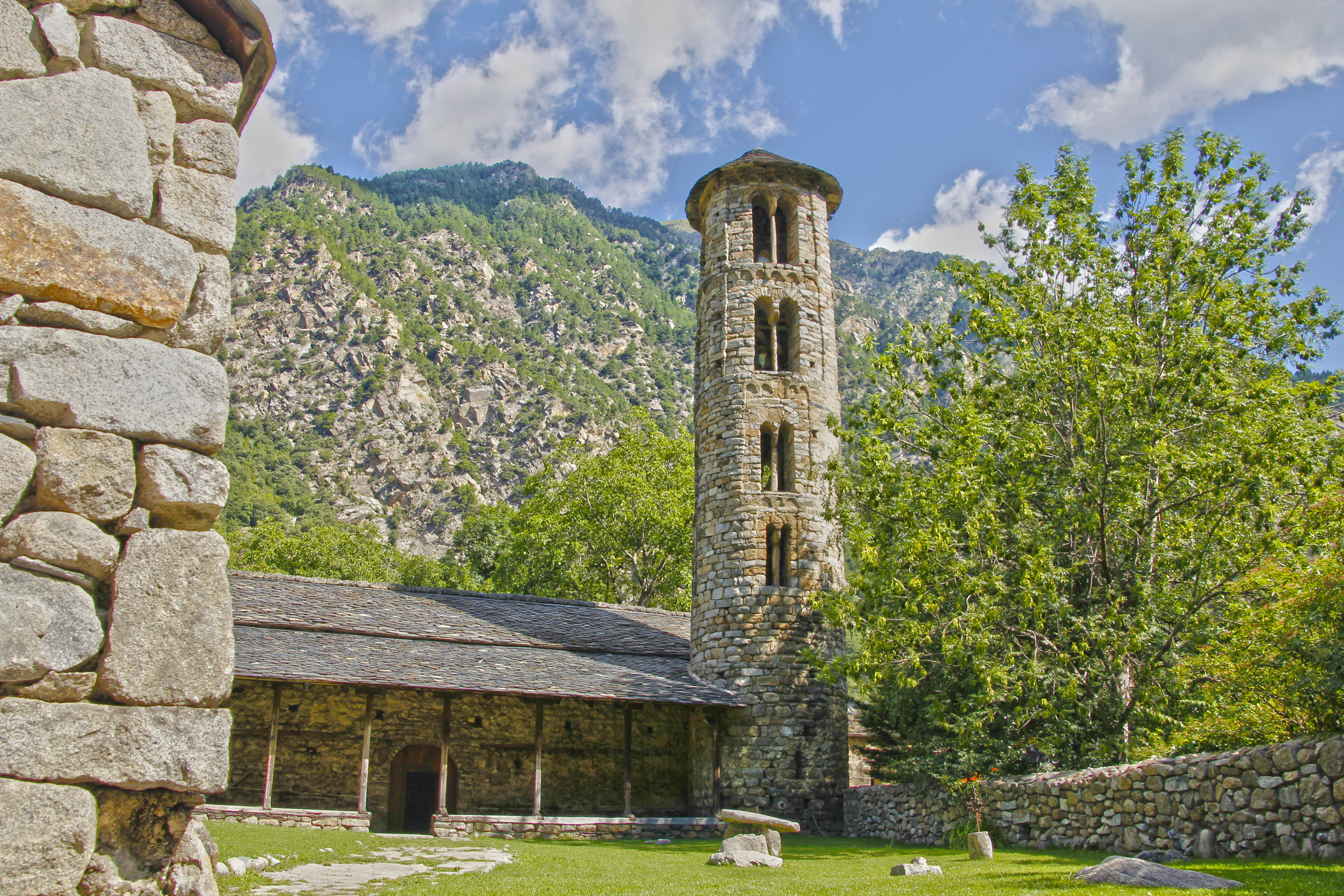 Església de Santa Coloma